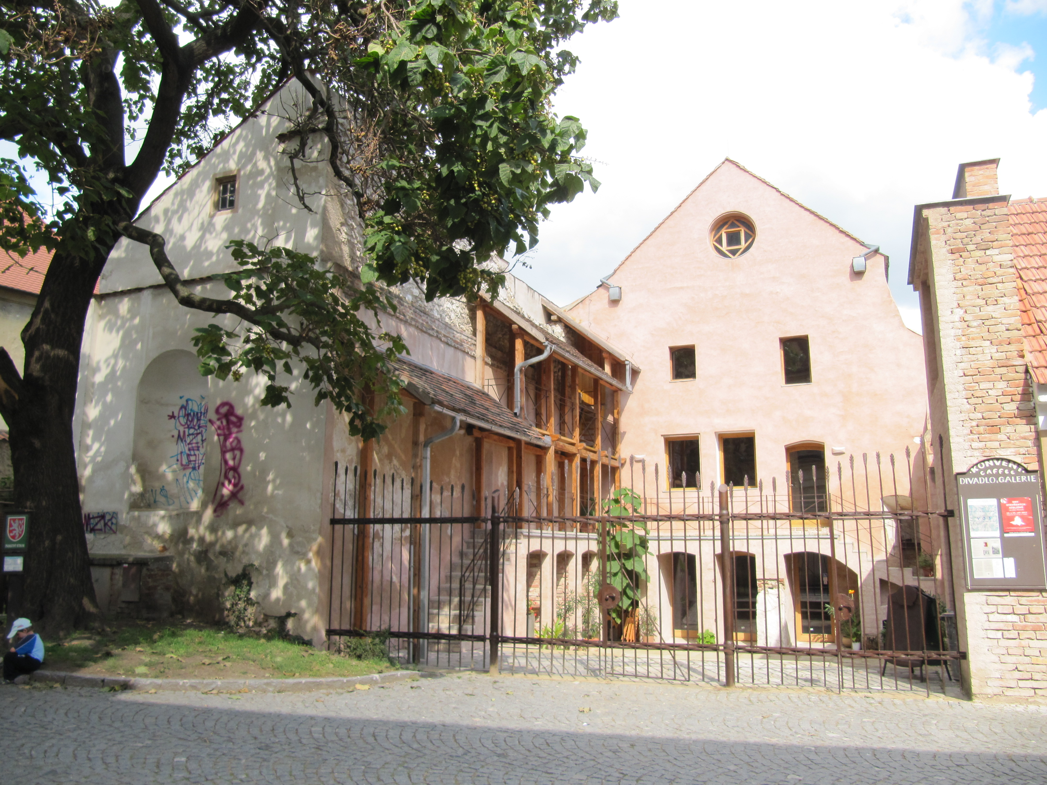 Rodinný dům (Mikulov), Vrchlického 169/1, Mikulov